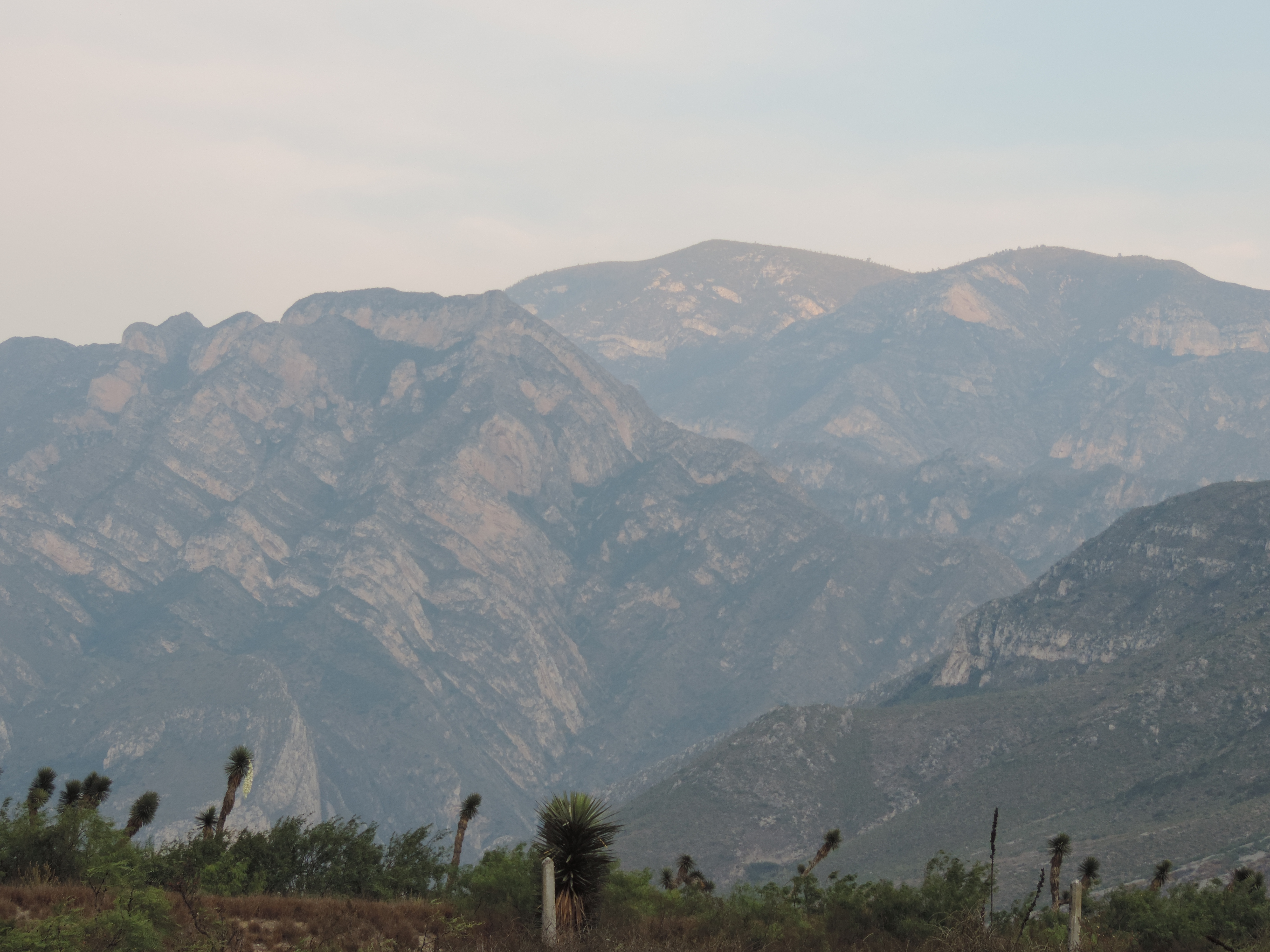 Sierra de San Urbano al fondo, desde las faldas de la Sierra Corral de los Bandidos